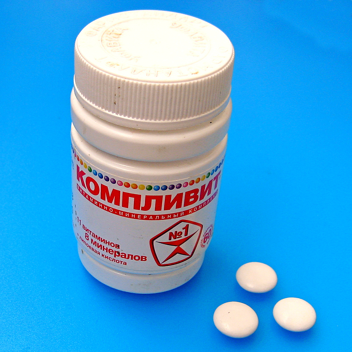 Поливитамины "Компливит". Фото А. Щекинова.